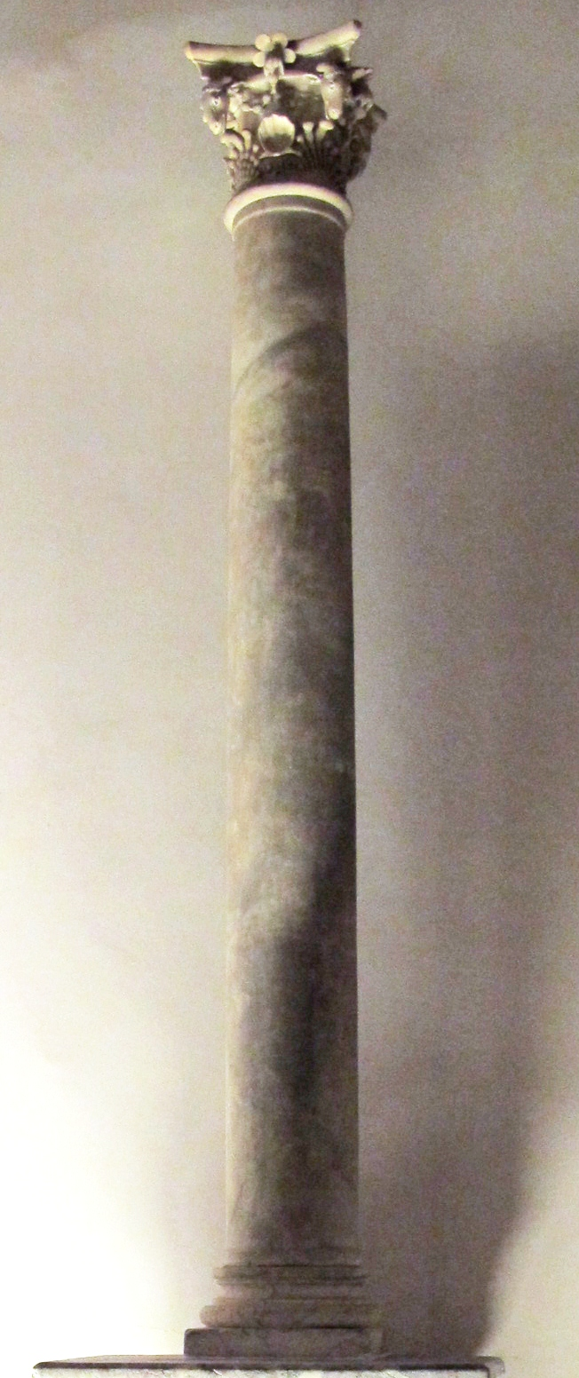 Una delle quattro colonne marmoree superstiti del coro di Nanni Unghero e Domenico di Francesco Baccelli (1520).